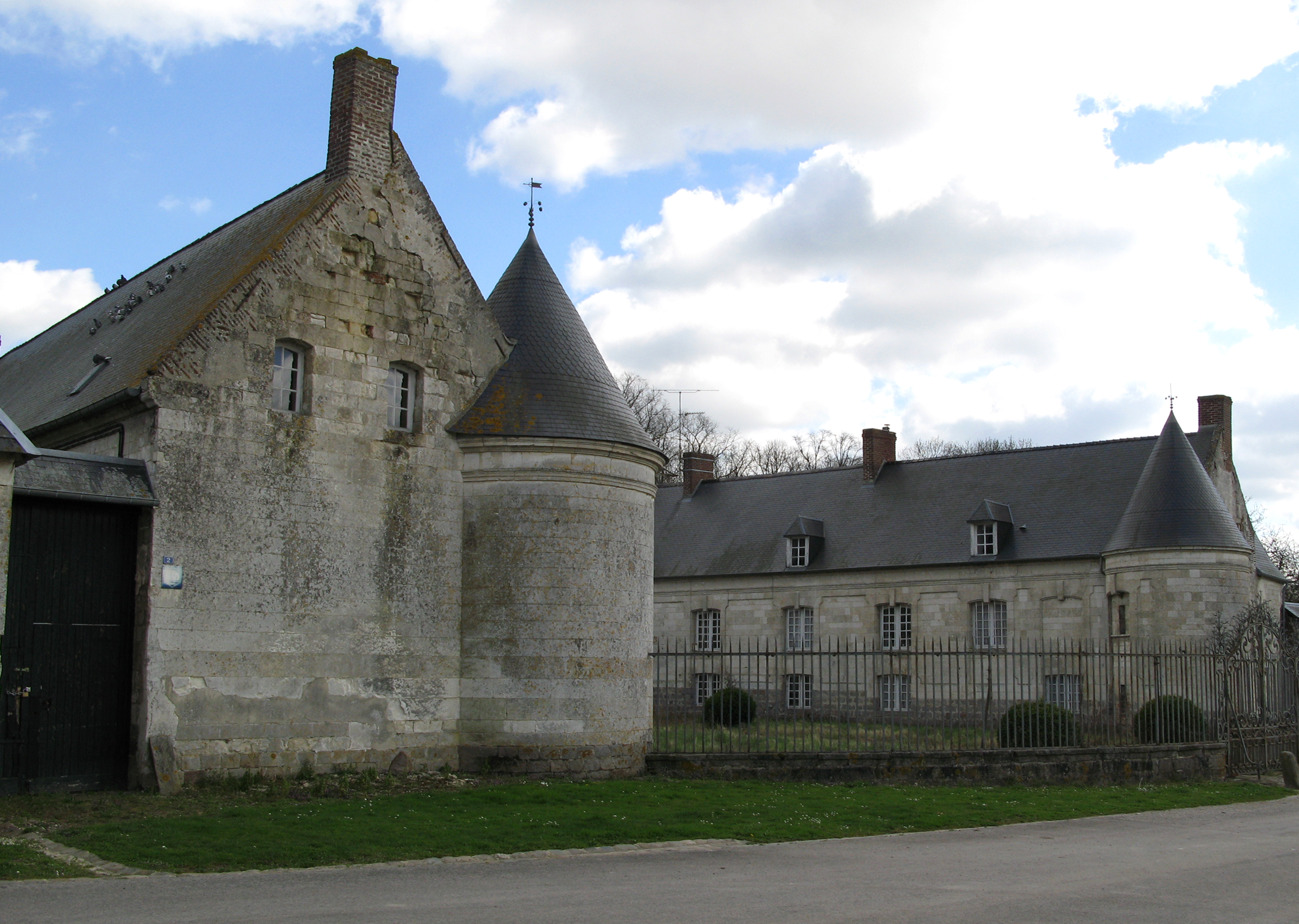 Vadencourt (Somme, France) - Le château.